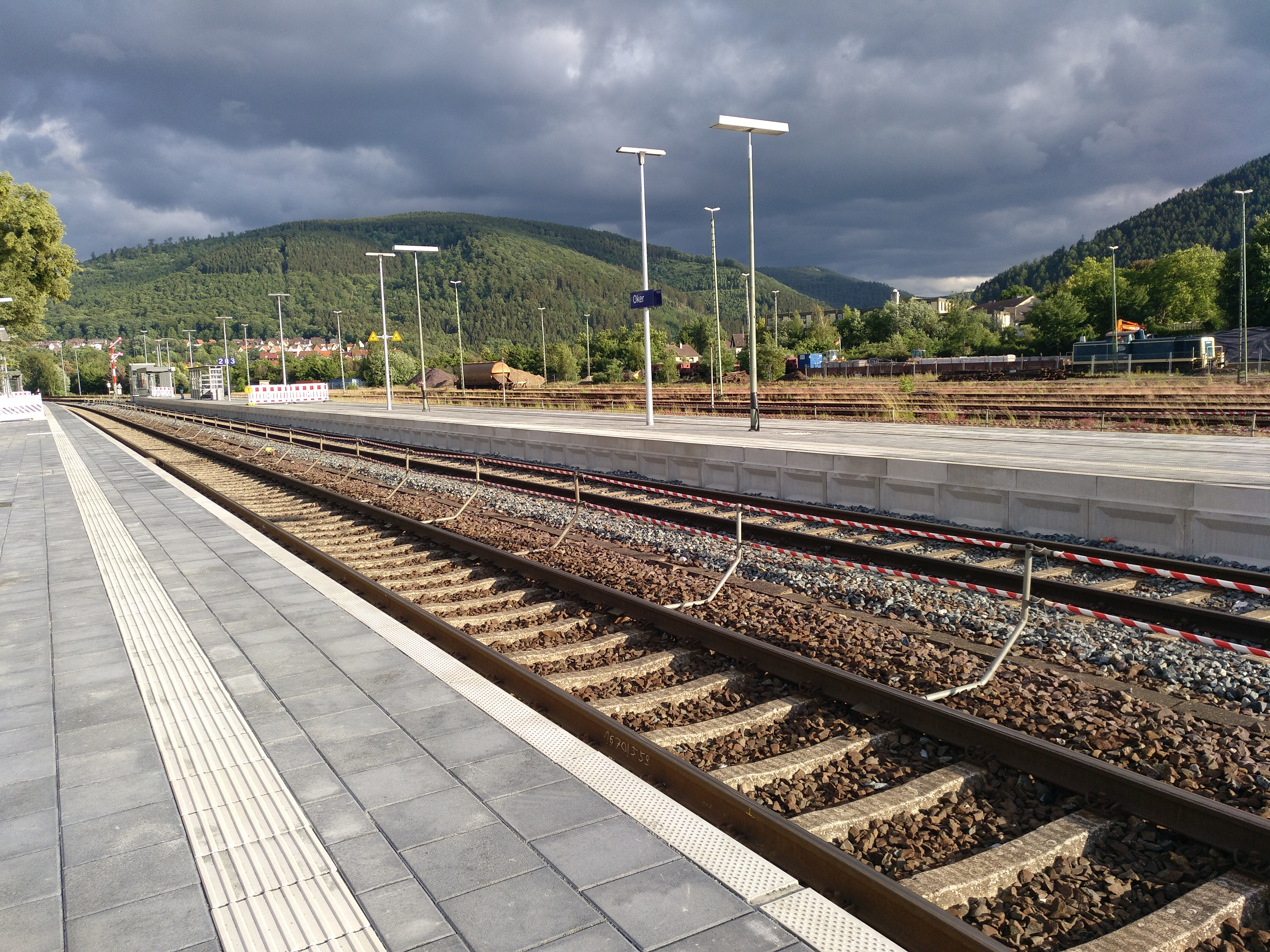 Äußerer Bahnsteig im Bahnhof Oker während der Umbauarbeiten, Juni 2018.